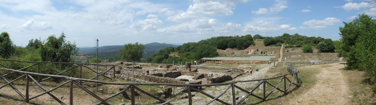 Panoramique composé du site de archéologique de Roselle